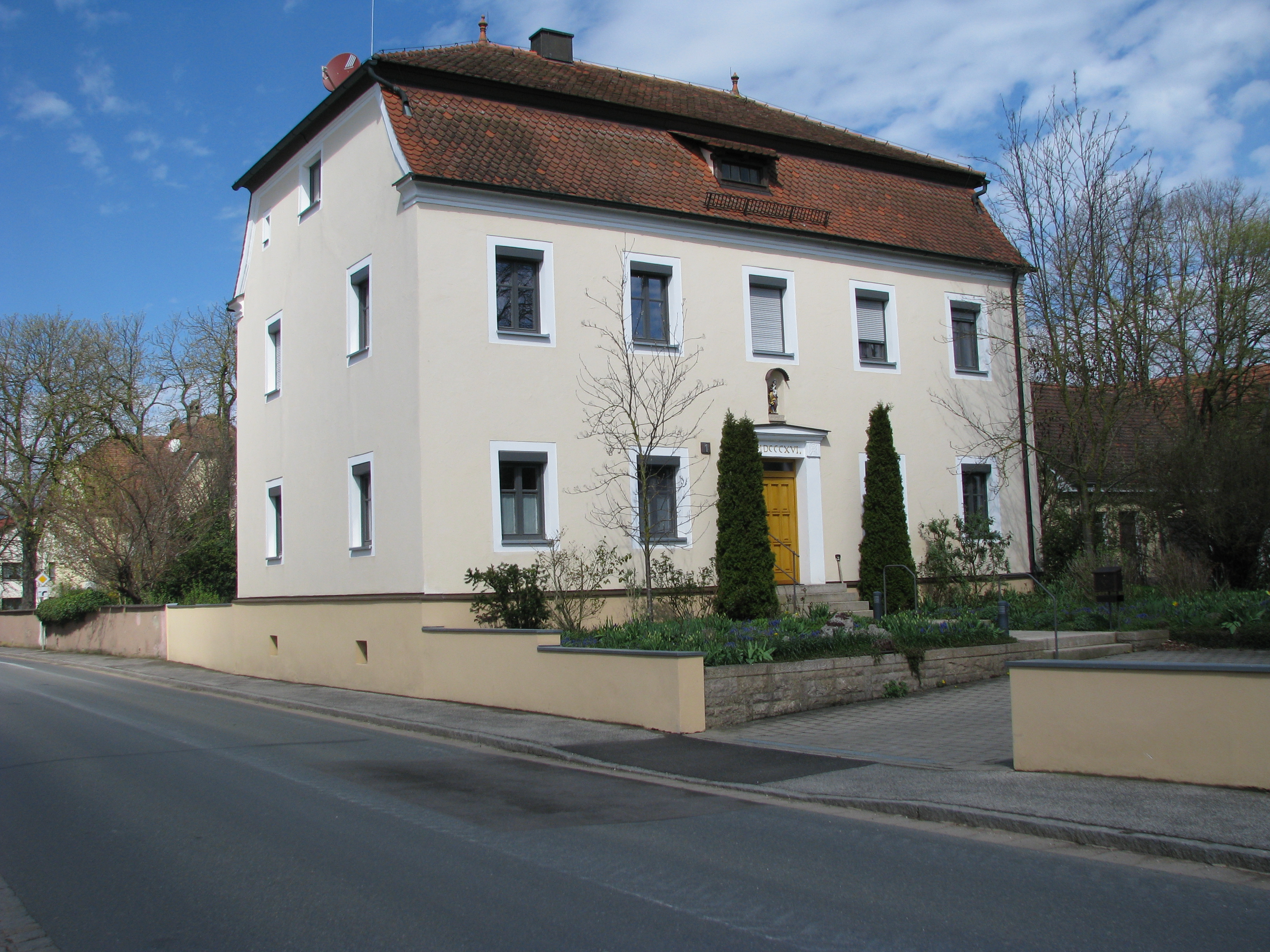 Möning, Ortsteil von Freystadt im Landkreis Neumarkt in der Oberpfalz, Pfarrhaus von 1816